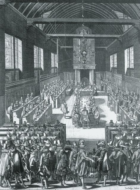 De Dordtse synode (1618). Gravure uit 1729 van B. Picart[1]